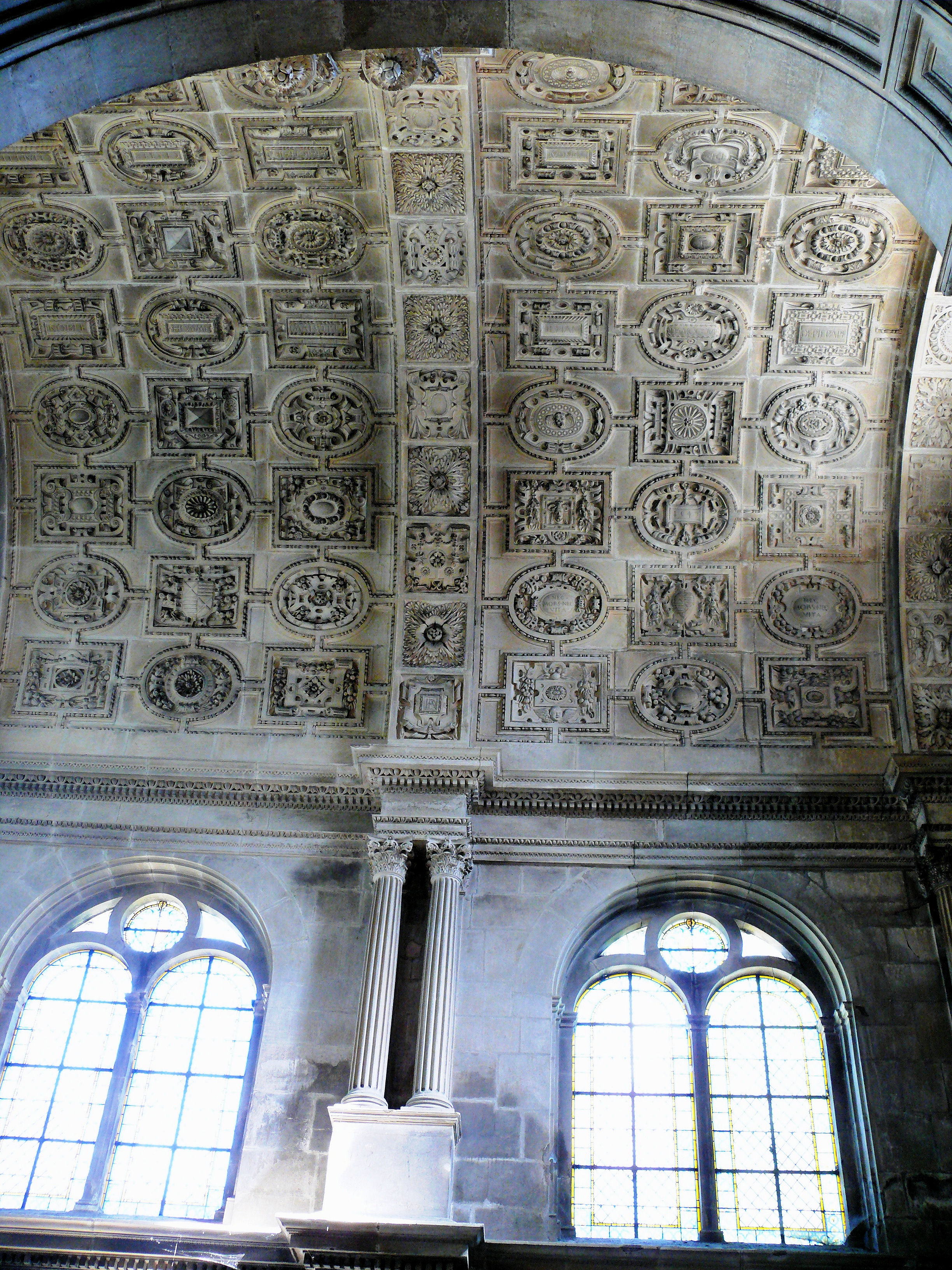 Langres - Cathédrale Saint-Mammès - Chapelle Sainte-Croix construite en 1547-1549 par Jean d'Amoncourt